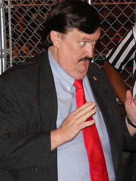 Paul Bearer